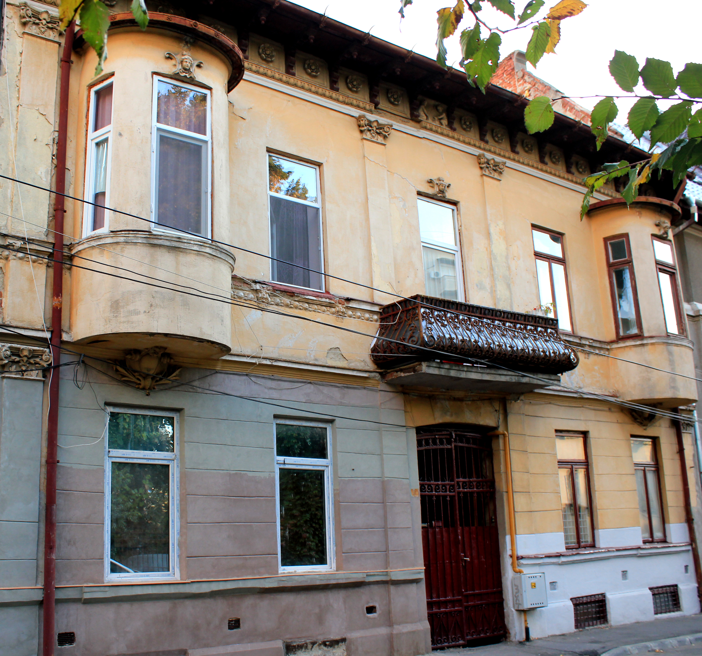 Casa Romano Alexandru 8